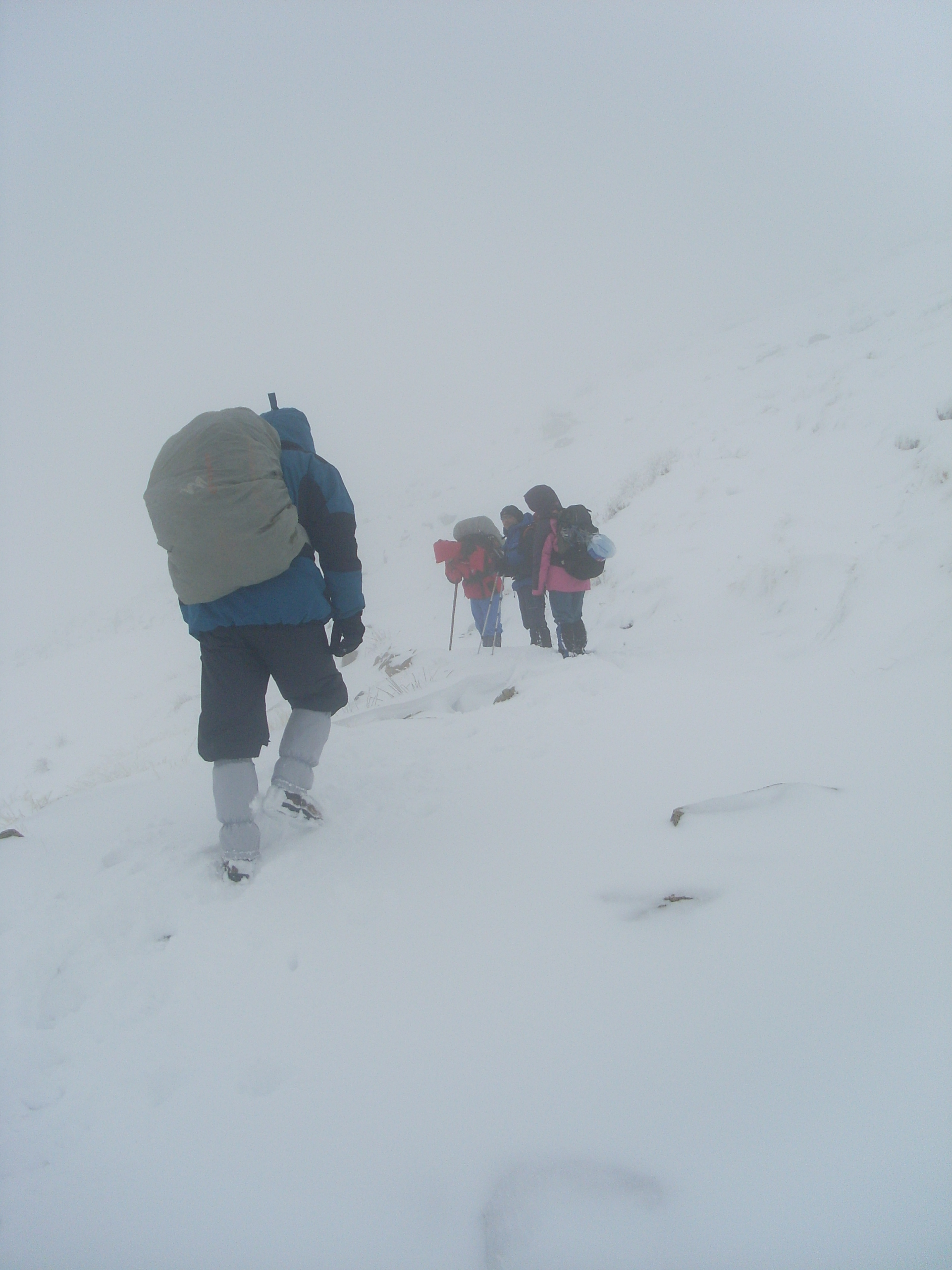 Ventisca en Barrerones, Sierra de Gredos, marzo de 2008.